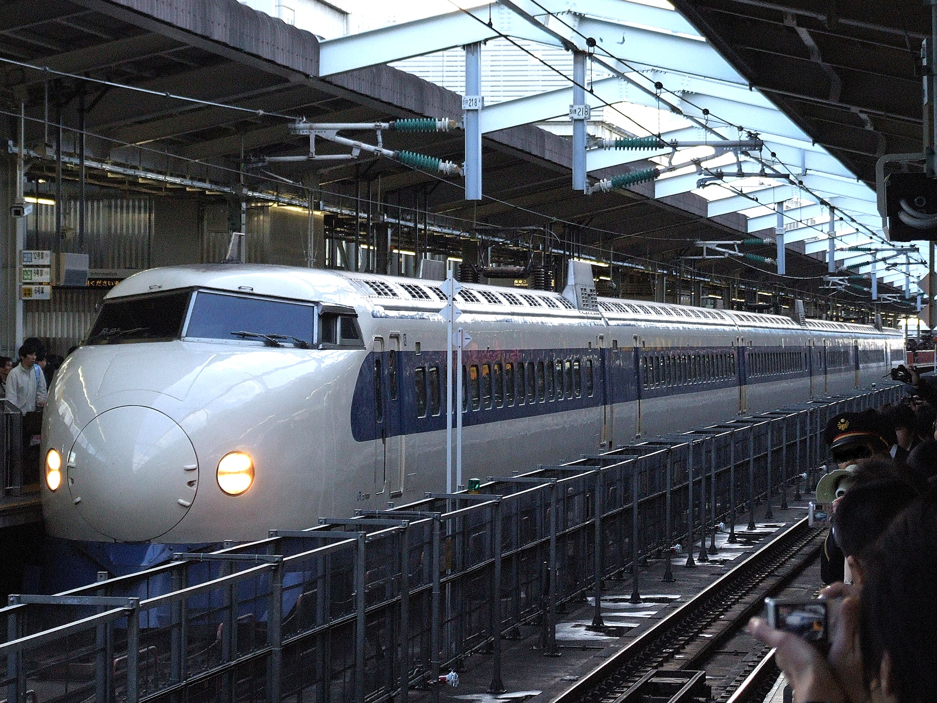 Own work